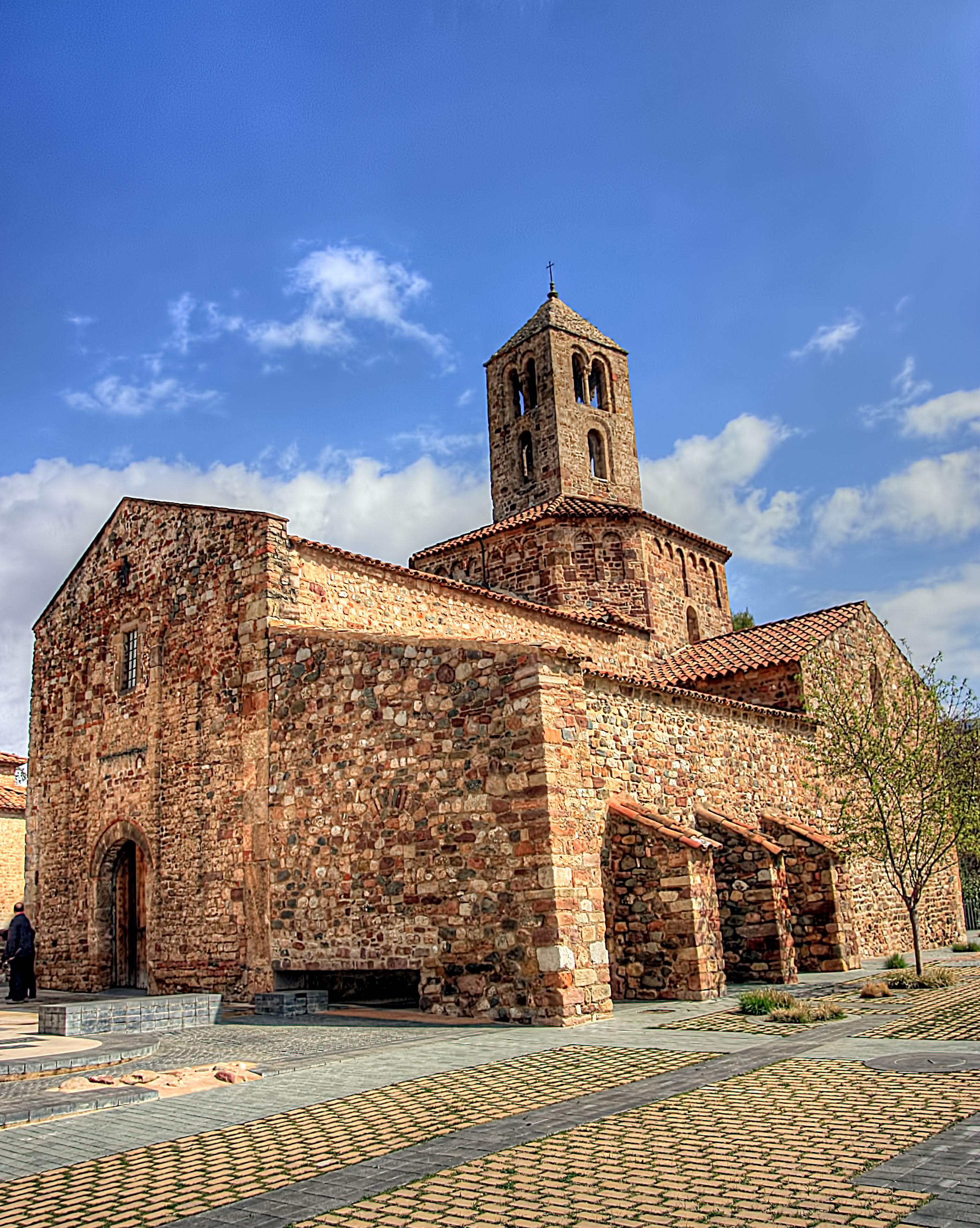 Església de Santa Maria (Terrassa)